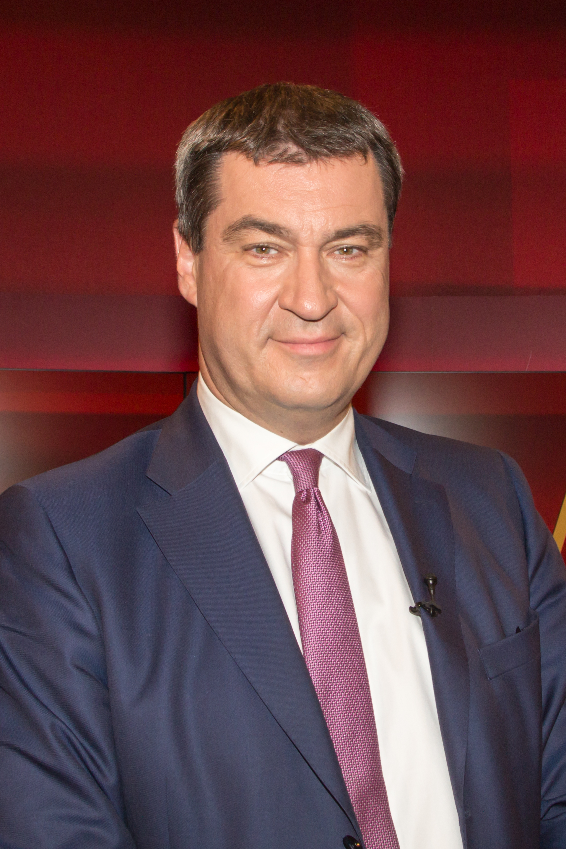 Markus Söder in der WDR-Sendung "hart aber fair" am 18.4.2016